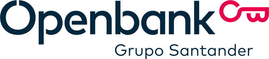 Logo de Openbank Grupo Santander 2017